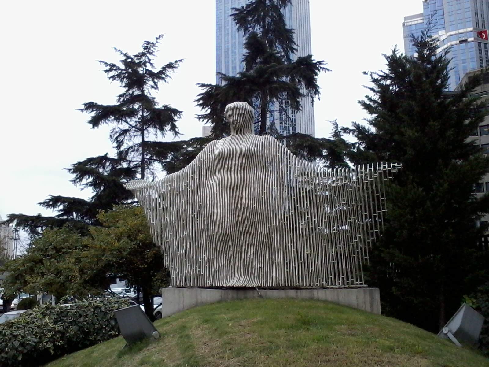 Akdeniz Heykeli, Beşiktaş.